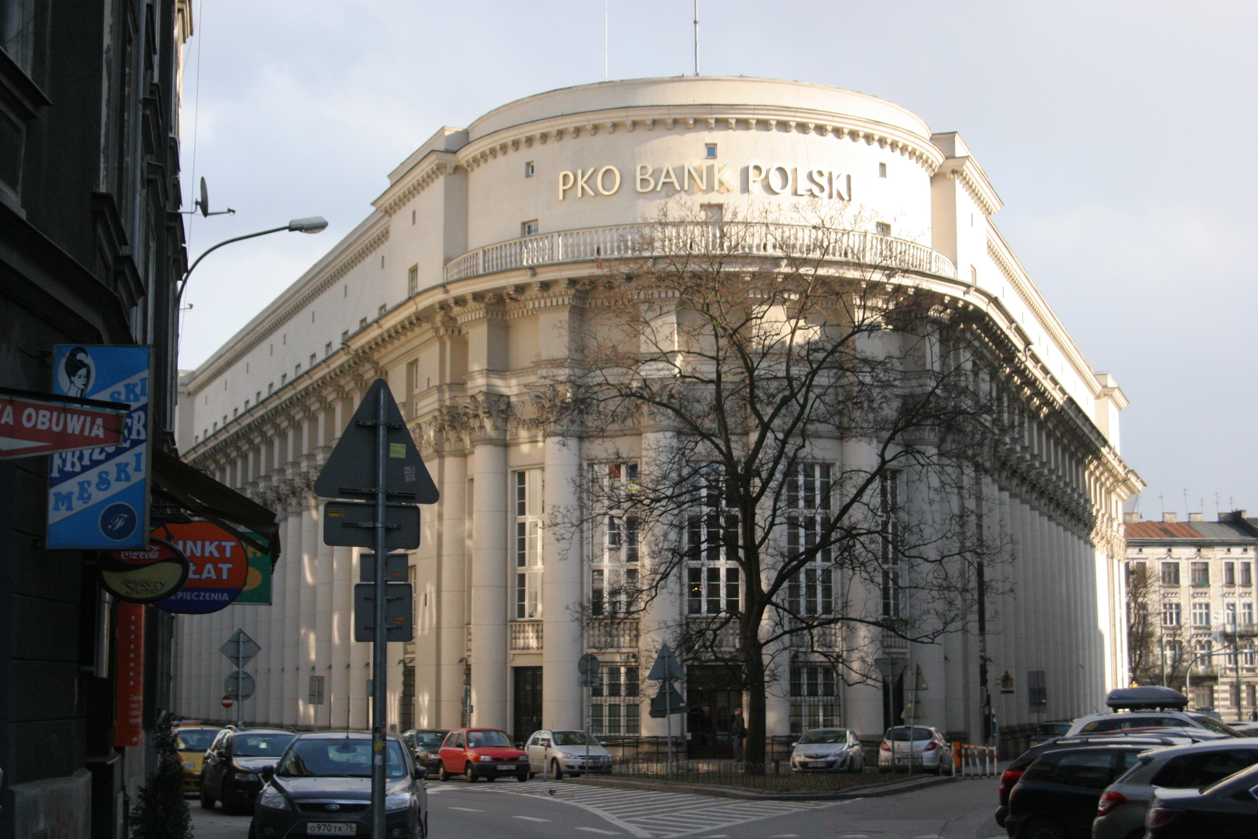 Budynek PKO BP, Kraków, ul. Wielopole. Proj. Adolf Szyszko-Bohusz